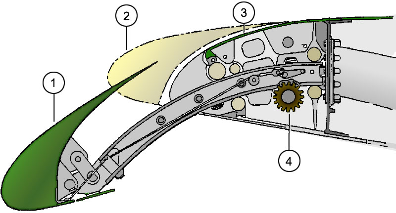 Versione a colori dell'immagine File:Slat A319.JPG